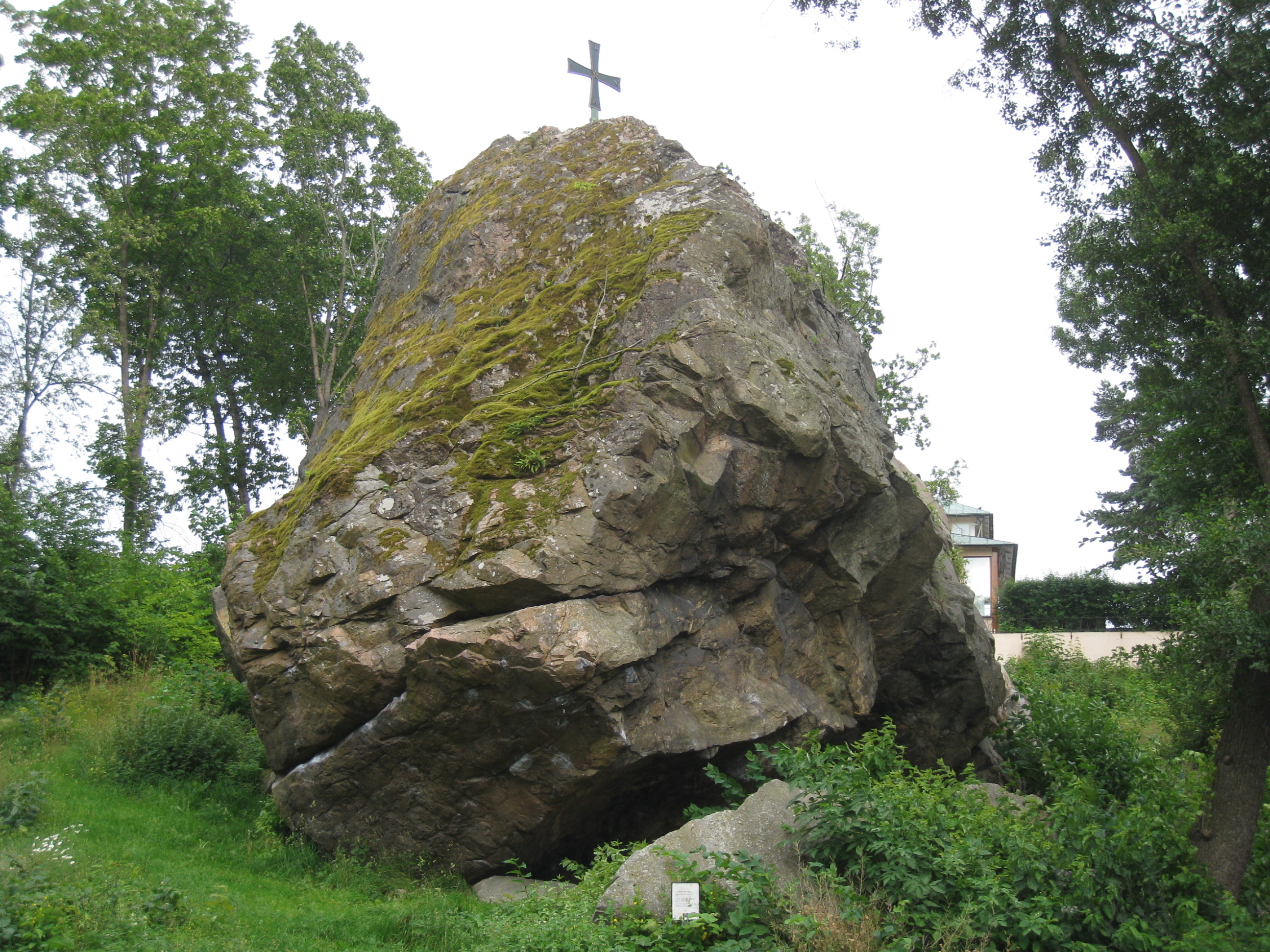 Ålstensparkens natur vid Mälaren i stadsdelen Ålsten i södra Bromma väster om Stockholm. Flyttblocket Ålstenen är omkring nio meter högt och är krönt med ett Arla Coldinuordens kors på toppen . Flyttblocket är ett av Stockholmstraktens allra största.